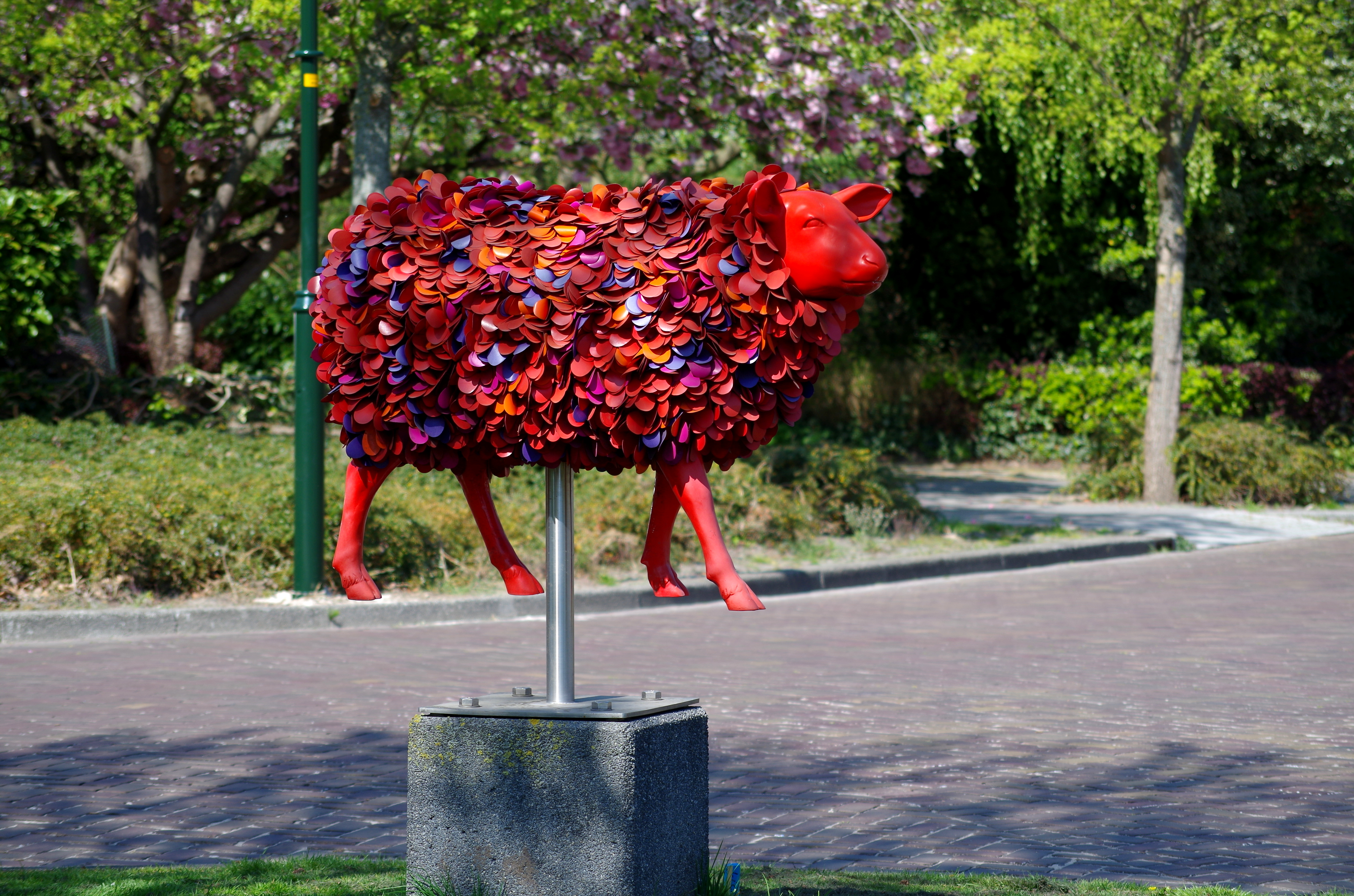 Het afgedwaalde schaap, Nanon Morsink (2011)